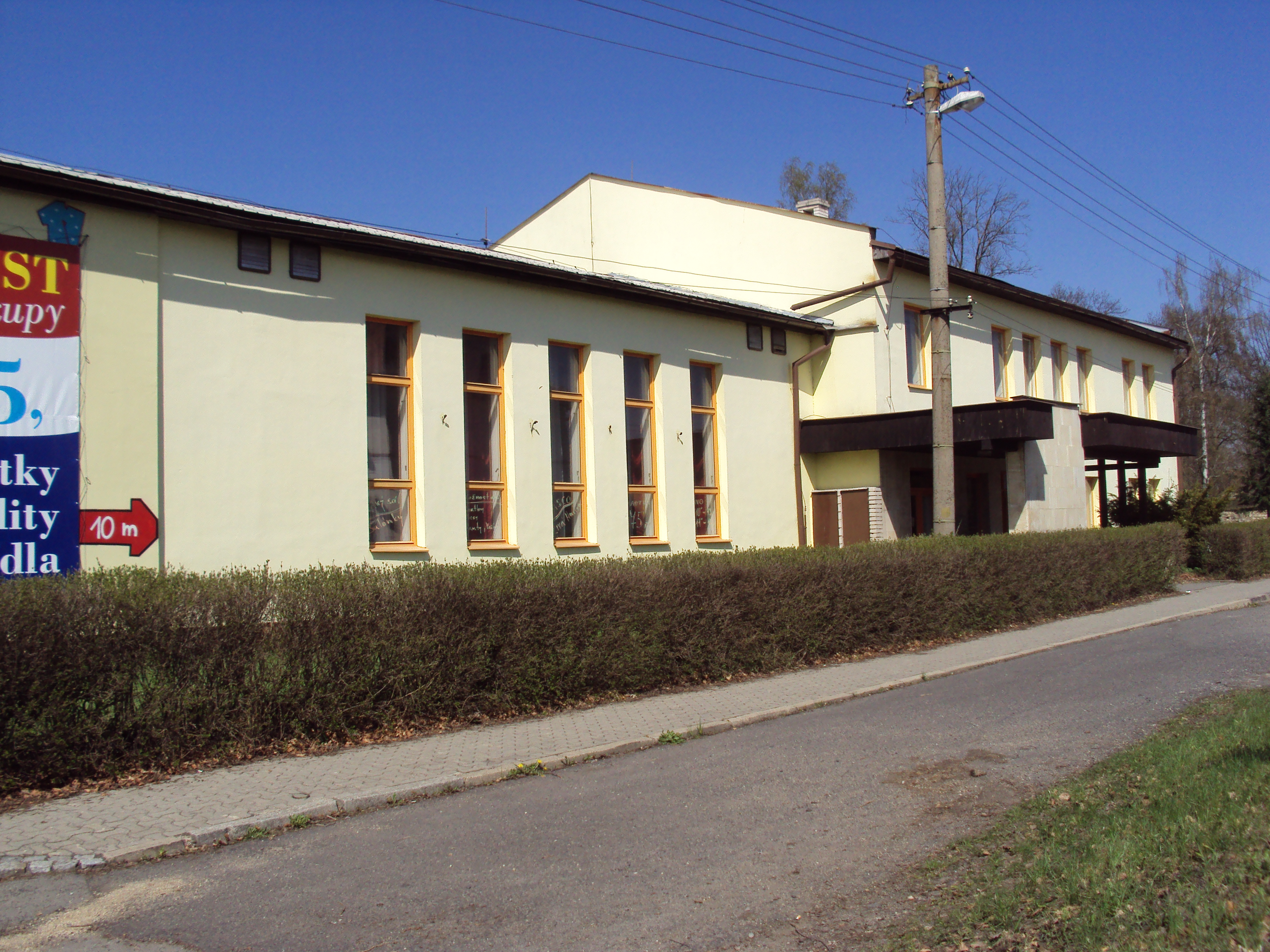 Budova kulturního domu v Zákupech